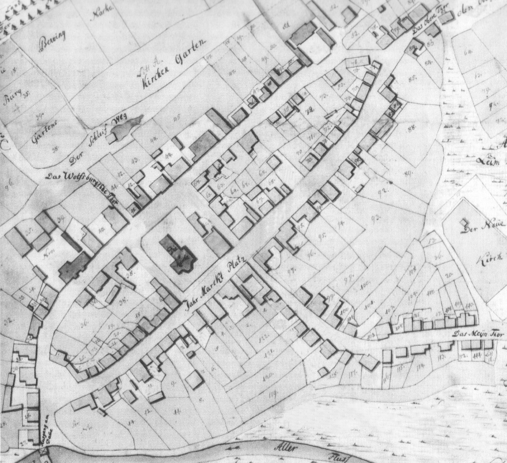 Plan von Vorsfelde von 1771